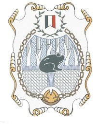 Tiene una forma completamente estilizada semejante a un óvalo. En campo de argenta los tallos de unas plantas de maíz y de caña de azúcar. Al centro de la composición, sobre ondas azul y plata, un sapo en su color y vuelto a la siniestra. En la punta del escudo un diseño tramado en colores verde, azul y plata. A manera de bordura una cadena dorada circunda al blasón hasta la punta, donde convergen los dos extremos en la figura de un casco roto en la parte superior. Los adornos exteriores llevan, por timbre, una guirnalda con hojas de laurel y olivo en cuyo centro resalta una bandera con los colores patrios. Los elementos ornamentales se complementan con una figura que asemeja un pergamino y que rodea al blasón a manera de lambrequines.